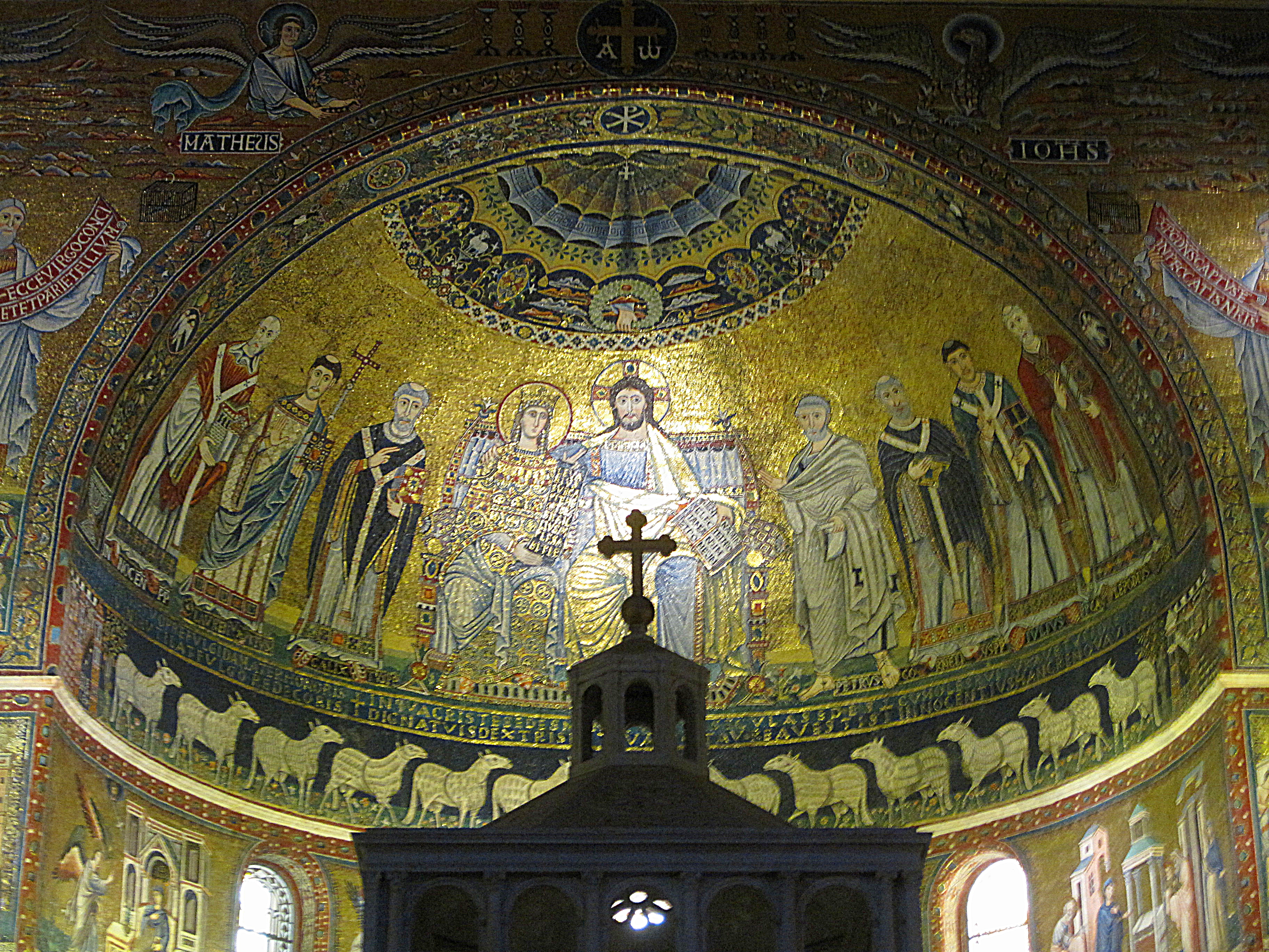 Mosaïques de l’abside représentant le Christ et la Vierge sur un trône, les saints Calixte et Laurent, le pape Innocent II, Pierre, Corneille, Jules Ier et Calépode. Au-dessous, deux files d'agneaux se dirigent vers l'Agneau de Dieu.- Basilica di Santa Maria in Trastevere à Rome (Italie).